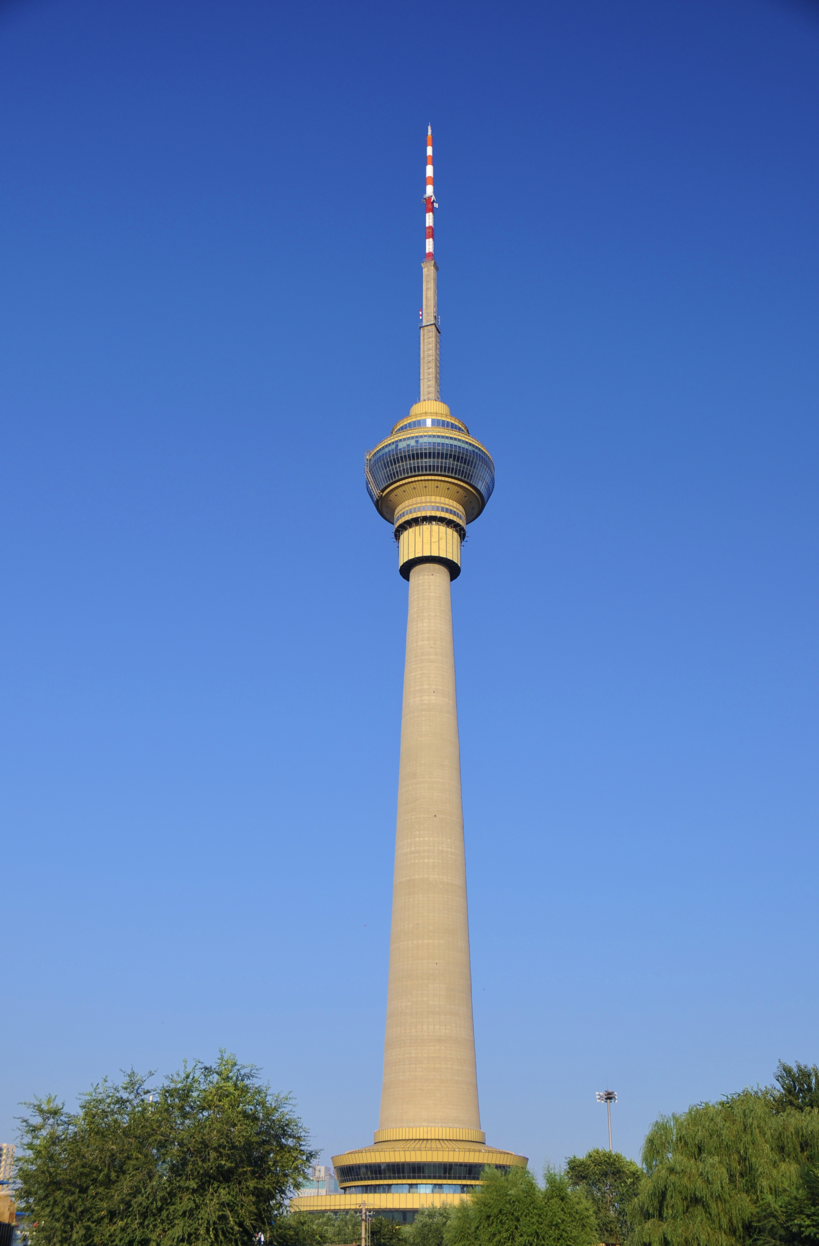 电视塔